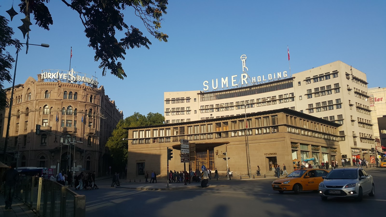 Sümerbank ve Türkiye İş Bankası (Ulus Meydanı), Ankara, 2015.